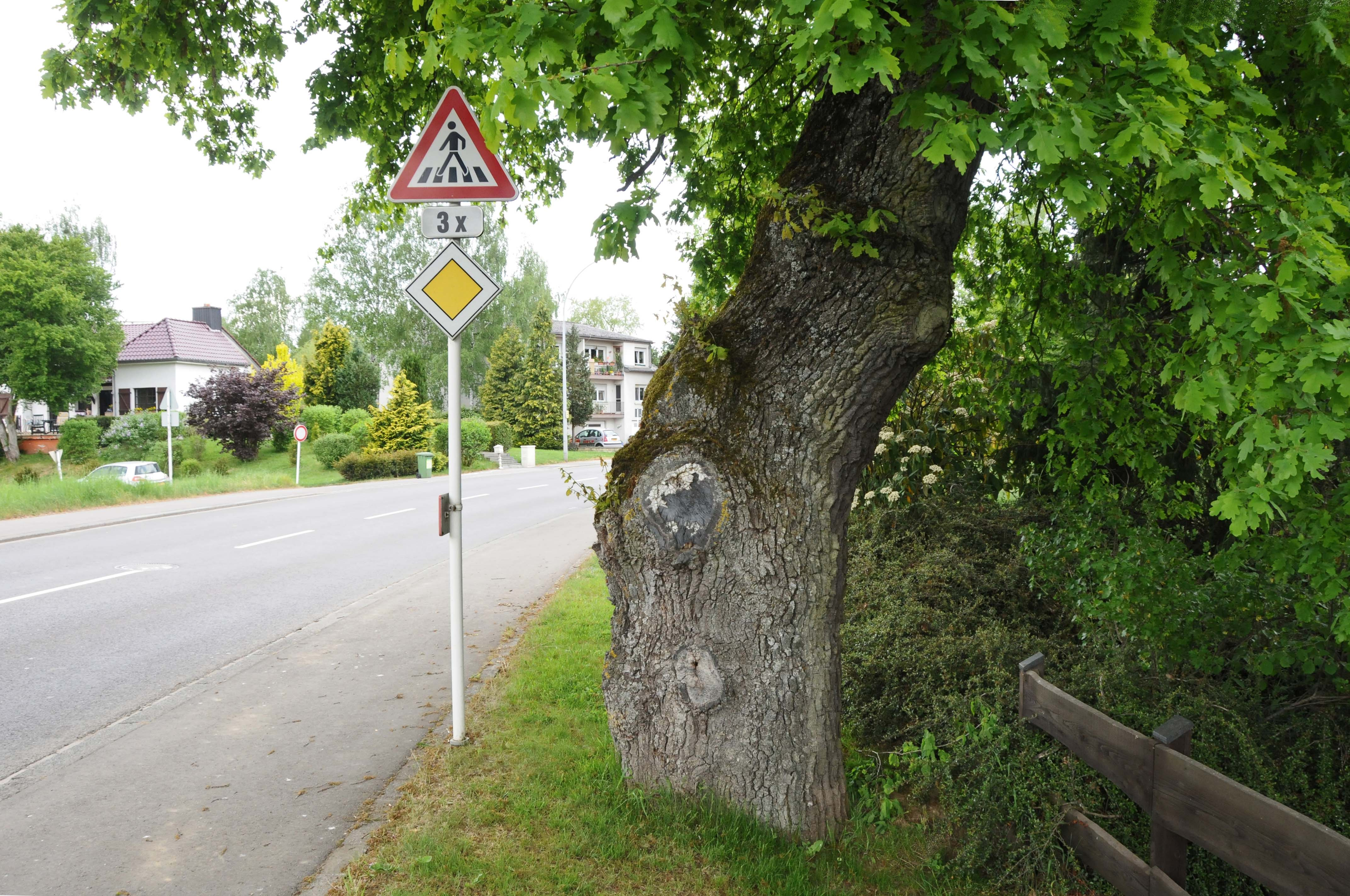 Eech um Schléiwenhaff. Schleiwenhaff + Kategorie:Gemeng Leideleng